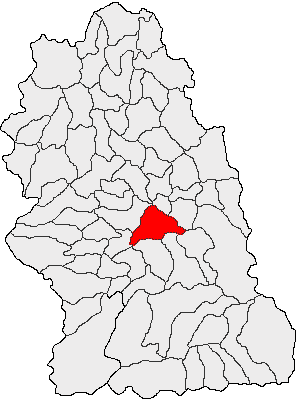 Categorie:Hărţi ale judeţului Hunedoara